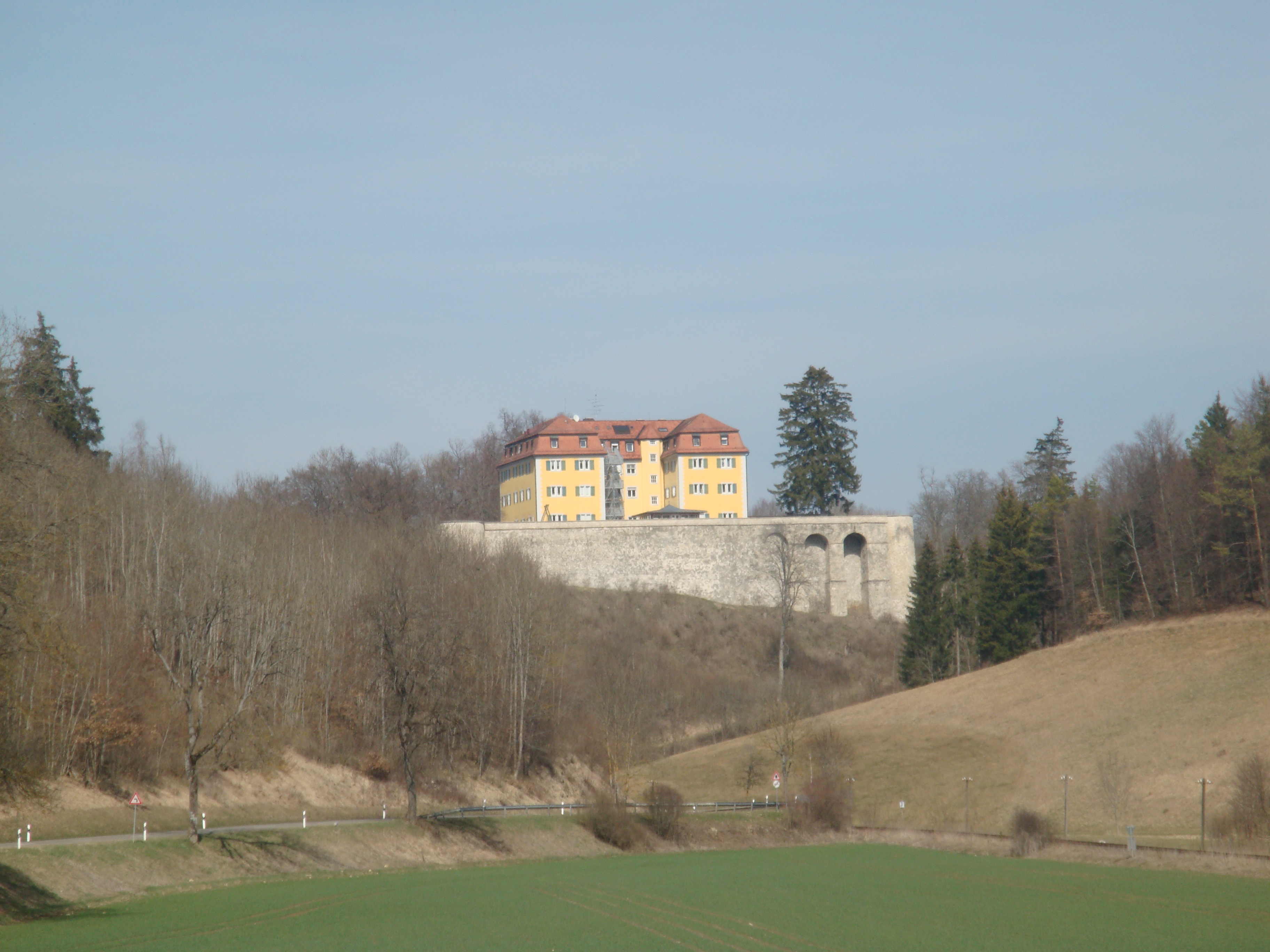 Schloss Grafeneck 28.03.2012